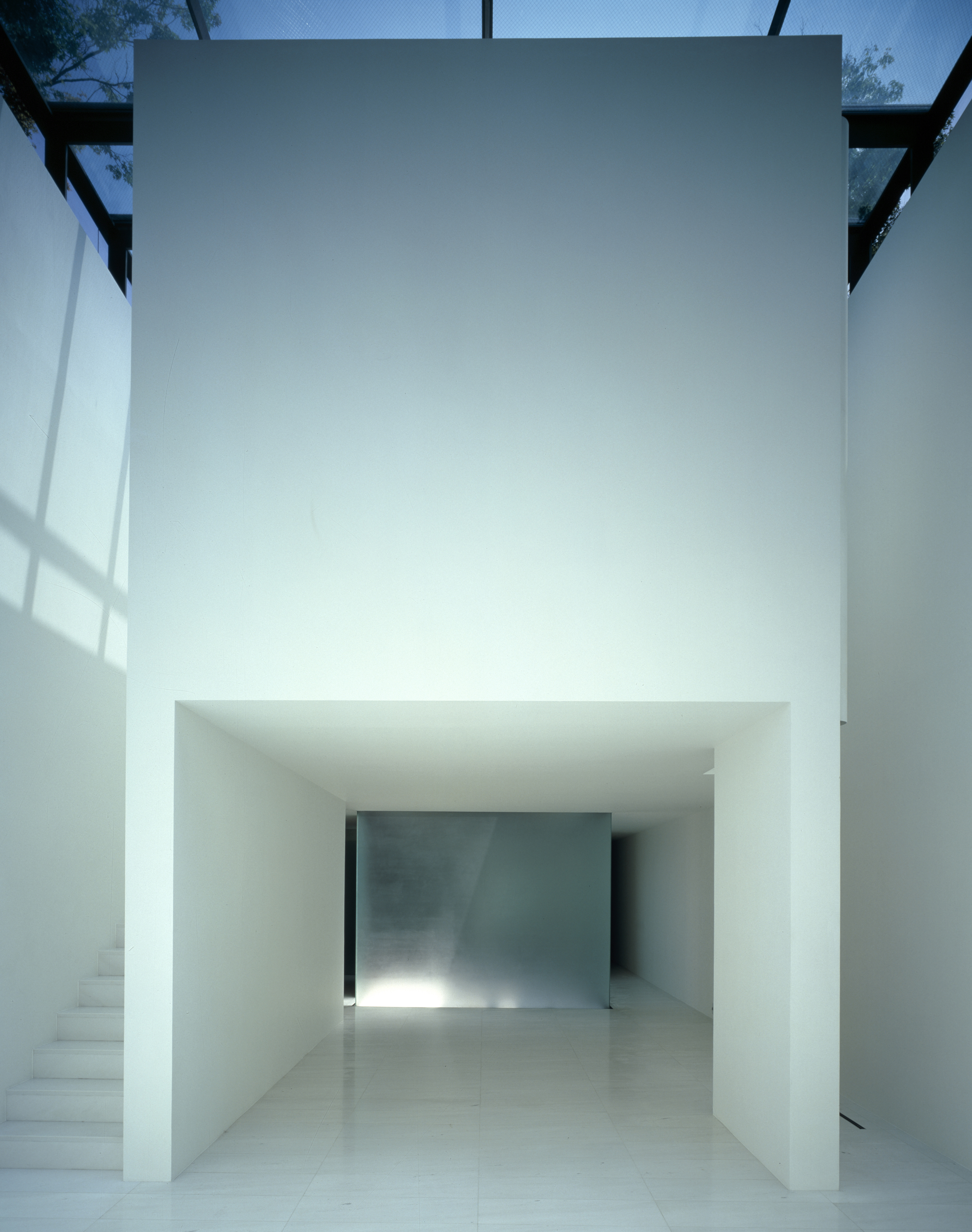 glass temple 外観